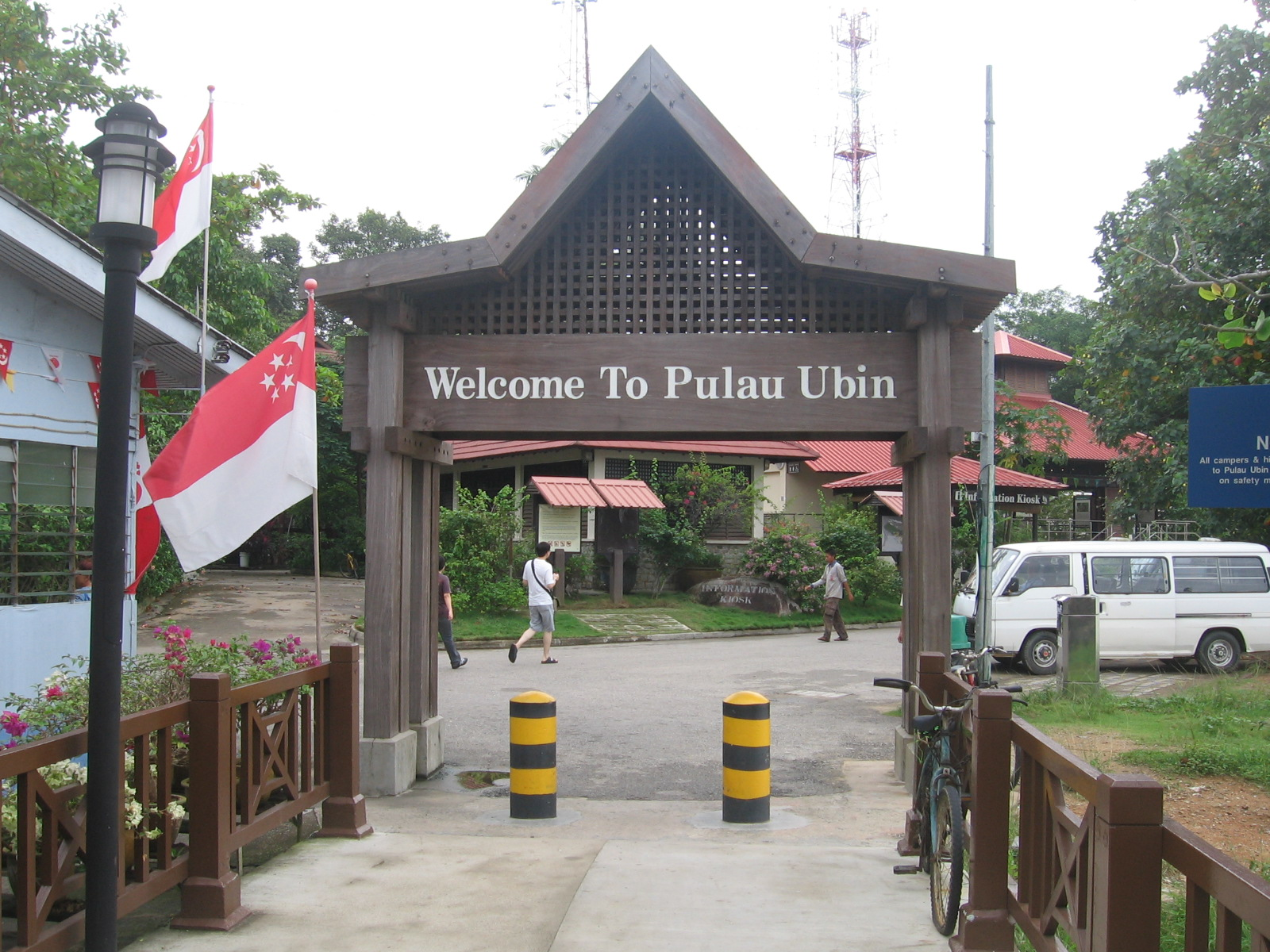 Pulau Ubin, Singapore